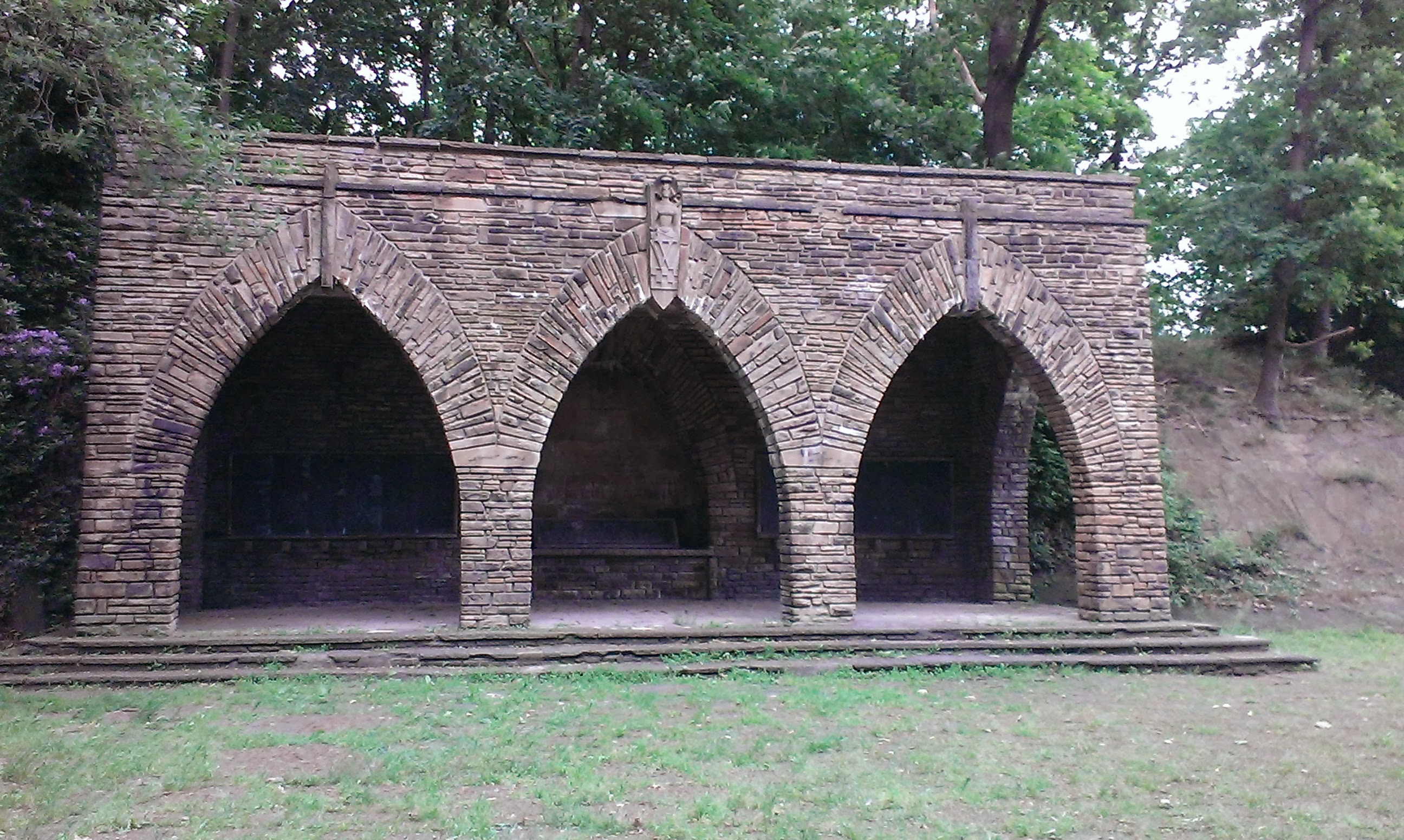 Ehrenmal für die Toten des 1. und 2. Weltkrieges in Alt-Wetter, Wetter (Ruhr)